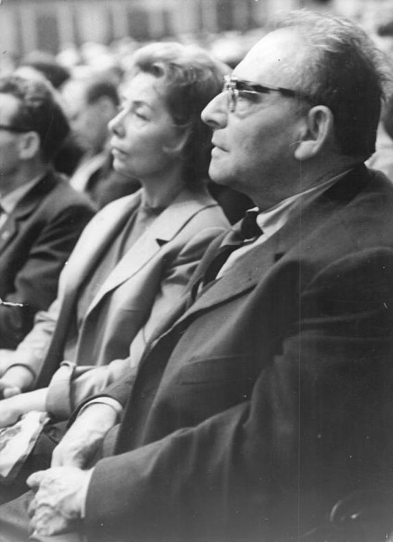 Zentralbild Brüggmann 14.9.1961 Prof. Kurt Hager sprach in der Deutschen Staatsoper Berlin. In der Deutschen Staatsoper Berlin sprach am 14.9.1961 auf einer Kundgebung Prof. Kurt Hager, Kandidat des Politbüros des ZK der SED, über die humanistische Forderung unserer Zeit: Abschluß eines Friedensvertrages mit beiden deutschen Staaten und die Umwandlung Westberlins in eine entmilitarisierte neutrale Freie Stadt. (Näheres siehe ADN-Meldung Nr. 720 vom 14.9.61) UBz: Prof. Wolfgang Heinz und Erika Pelikowski während der Kundgebung.